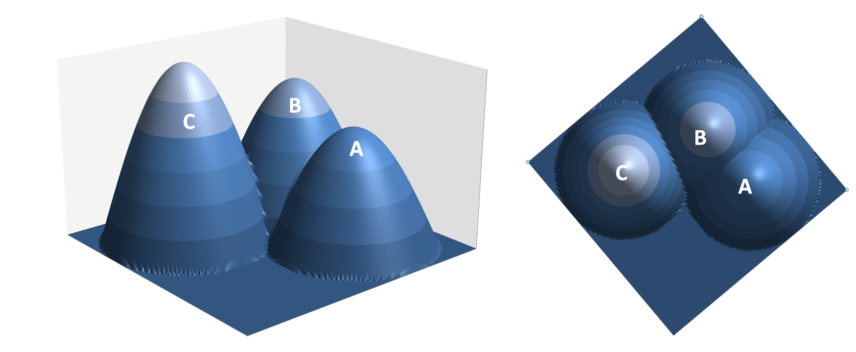 Drei Berge sind zu einer Insel verbunden. Das Höhenverhältnis der mit A, B und C gekennzeichneten Berge beträgt 4:5:6. Die Scharte zwischen den Gipfeln A und B liegt höher als zwischen den Gipfeln B und C. Um von Berg A aus einen höheren Gipfel zu erreichen, muss man mindestens in die Scharte zwischen Berg A und Berg B absteigen. Dies ist die Bezugsscharte für die Messung der Schartenhöhe des Berges A. Sie wird auch als Prominenzsattel bezeichnet. Siehe auch: Island Parent of Peak A Island Parent of Peak B